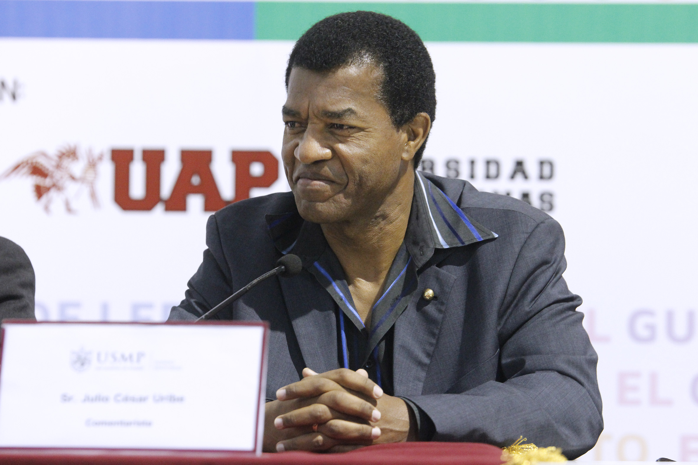 Julio César Uribe en la Feria del Libro Ricardo Palma, 2015.